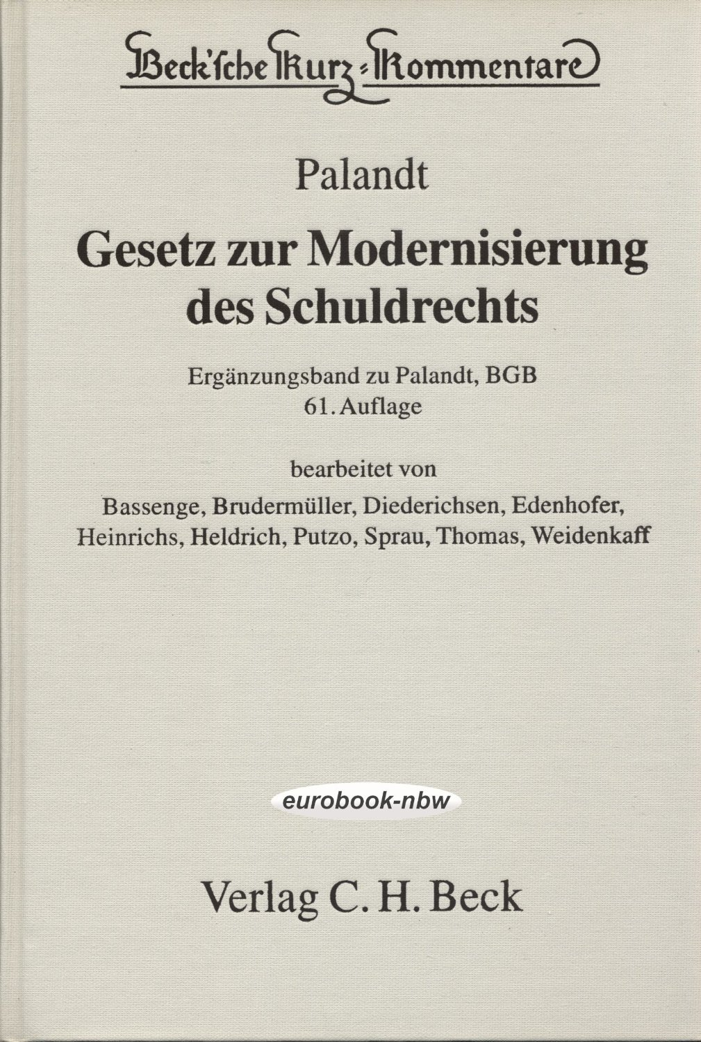 Gesetz zur Modernisierung des Schuldrechts